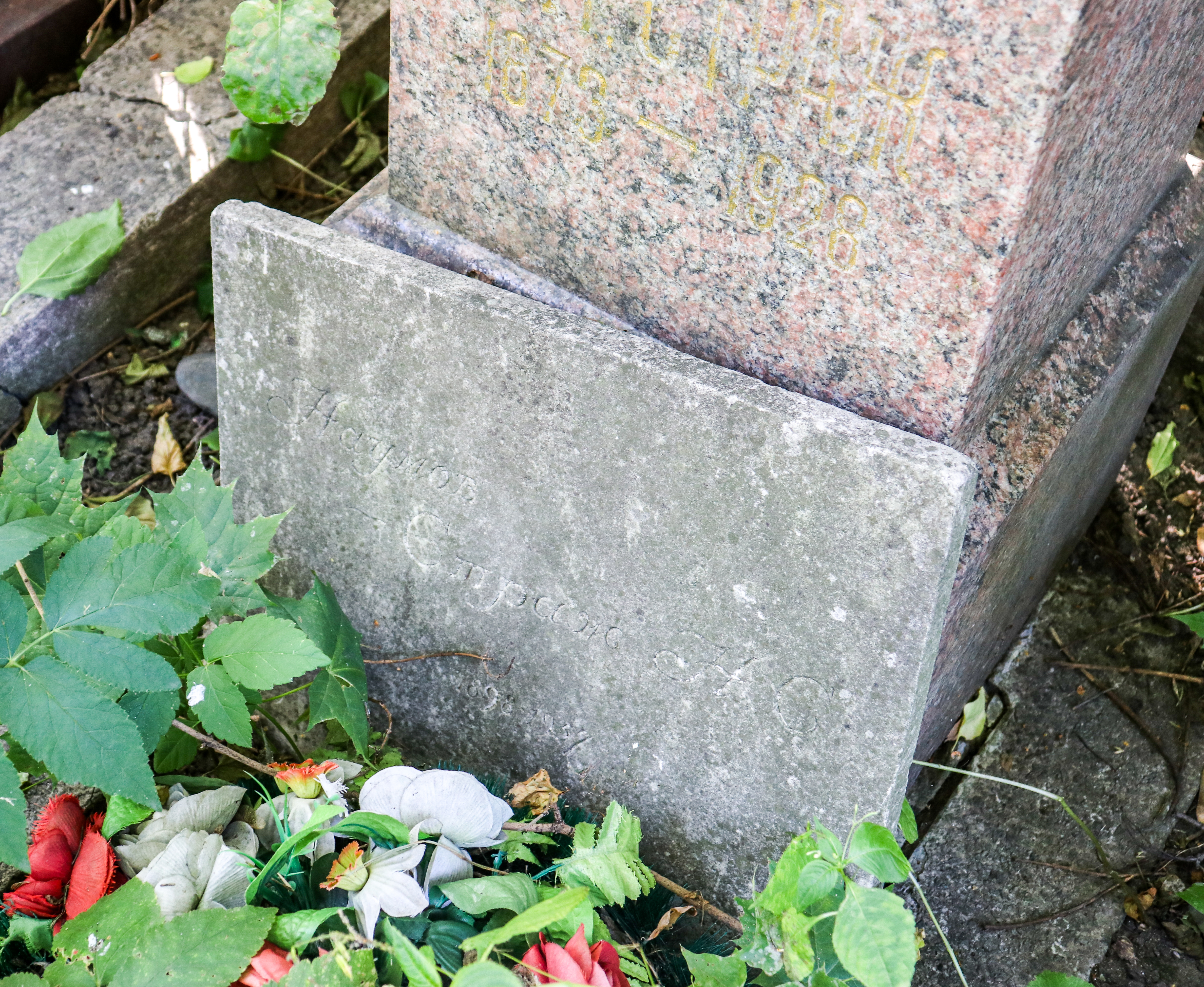 Могила Стража Соломона Наумовича, Берты Львовны Страж и Наумова-Стража Наума Соломоновича на Новодевичьем кладбище (2 участок, 10 ряд). Надпись: Наумов-Страж Н. С. 1898 - 1957